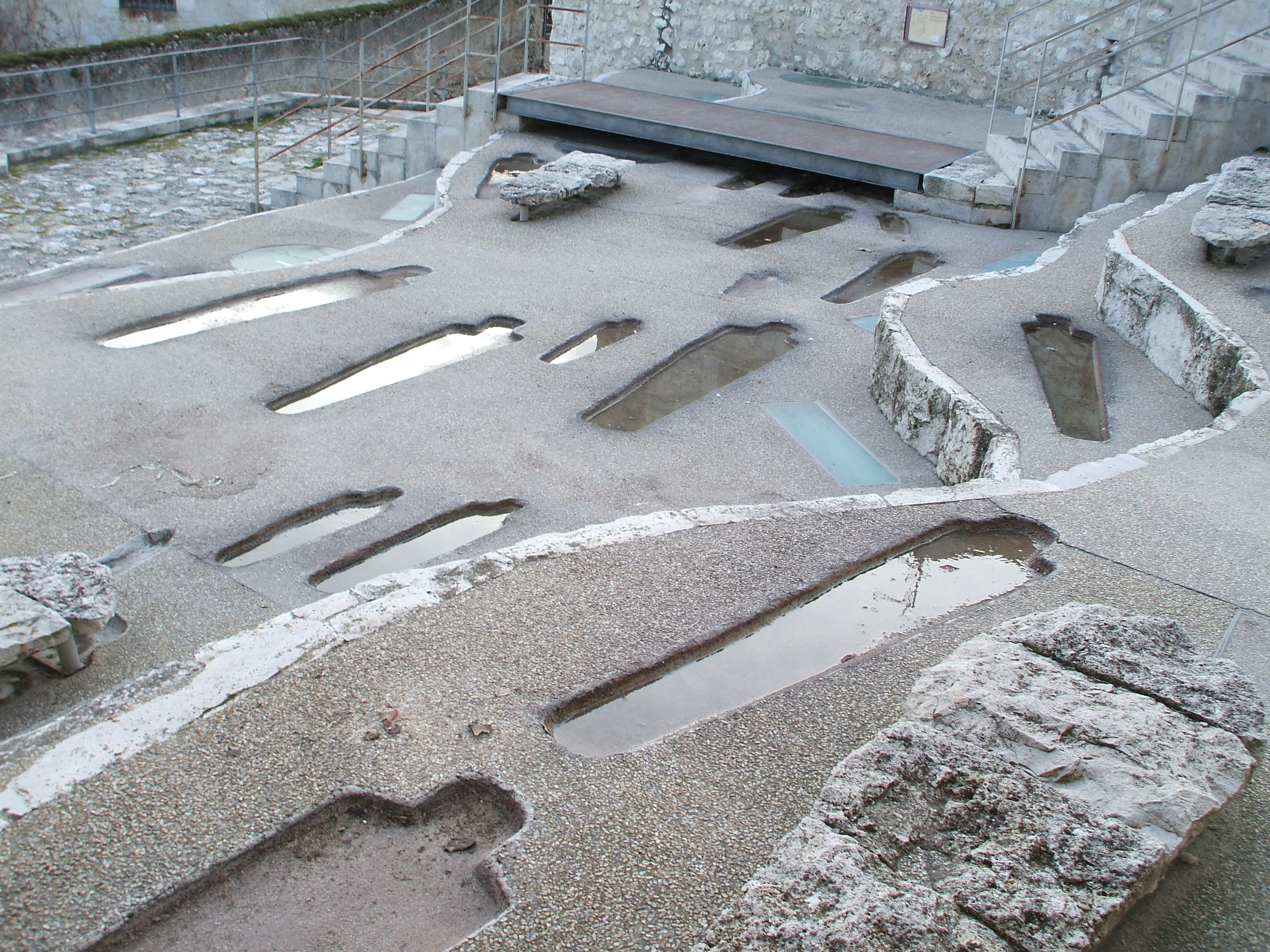 Parque arqueológico medieval de San Esteban (Cuéllar)